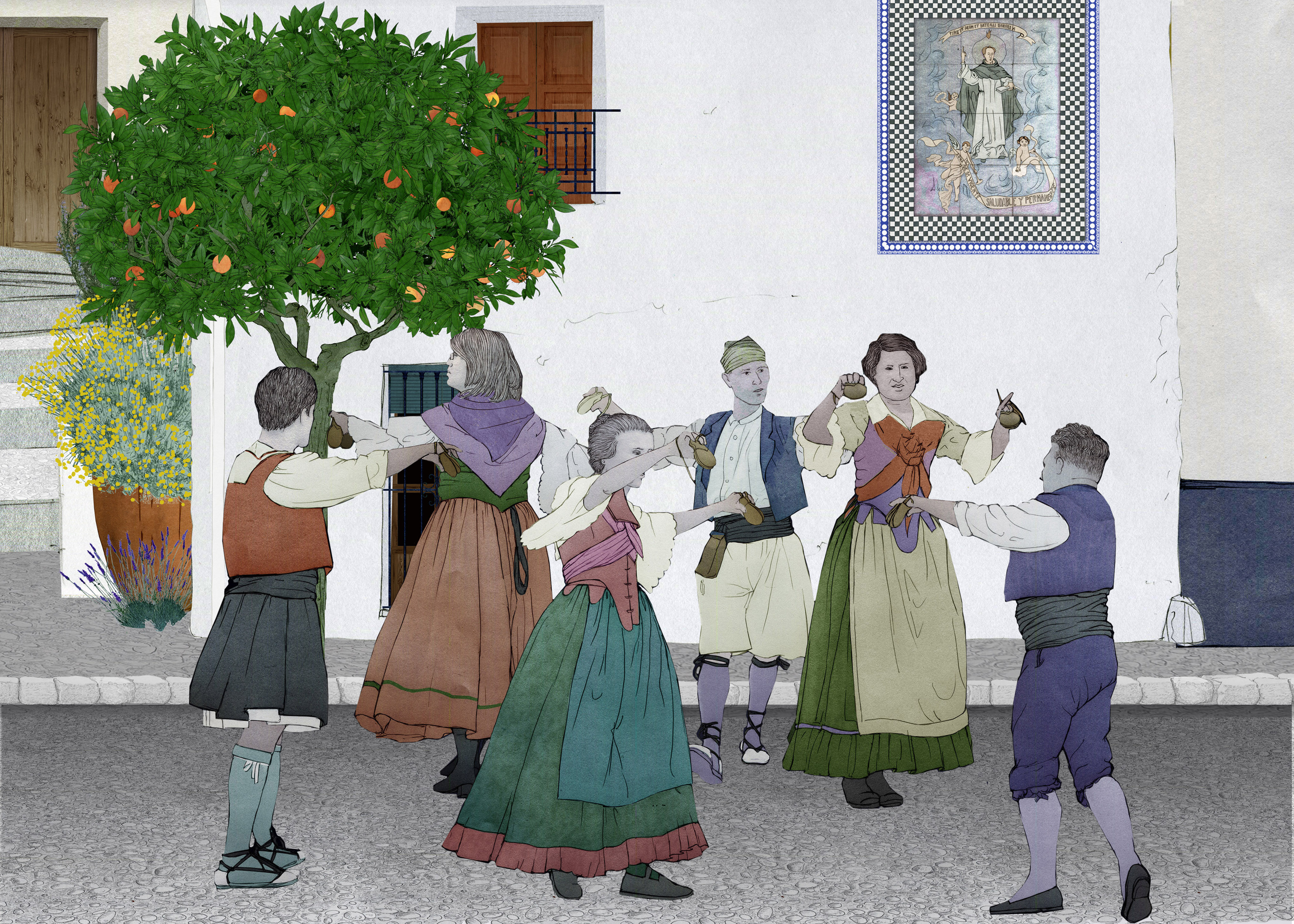 Grup de danses valencià al carrer.